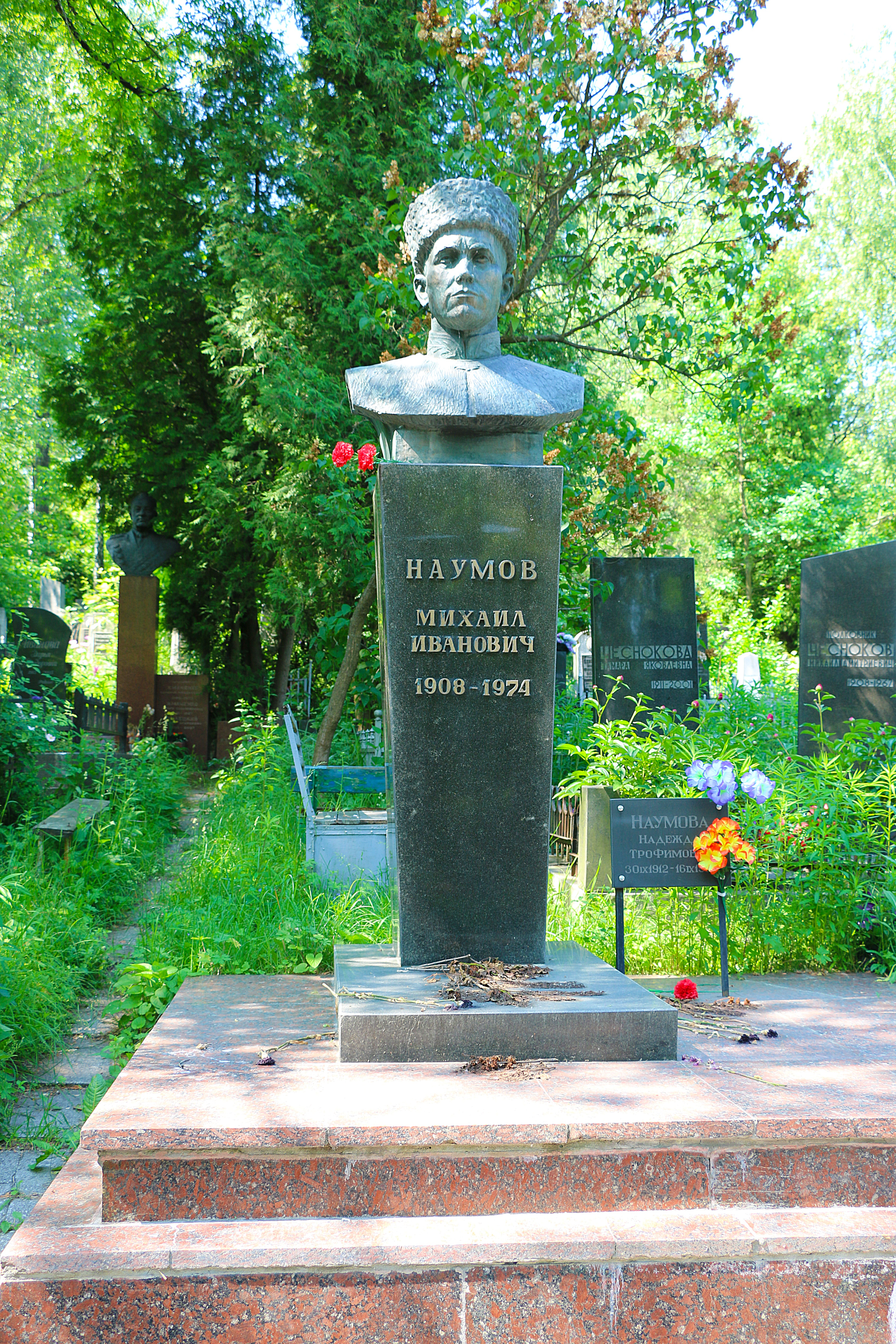 Могила Наумова М. І., учасника партизанського руху на Україні, Київ, вул. Байкова, 6, діл. 46